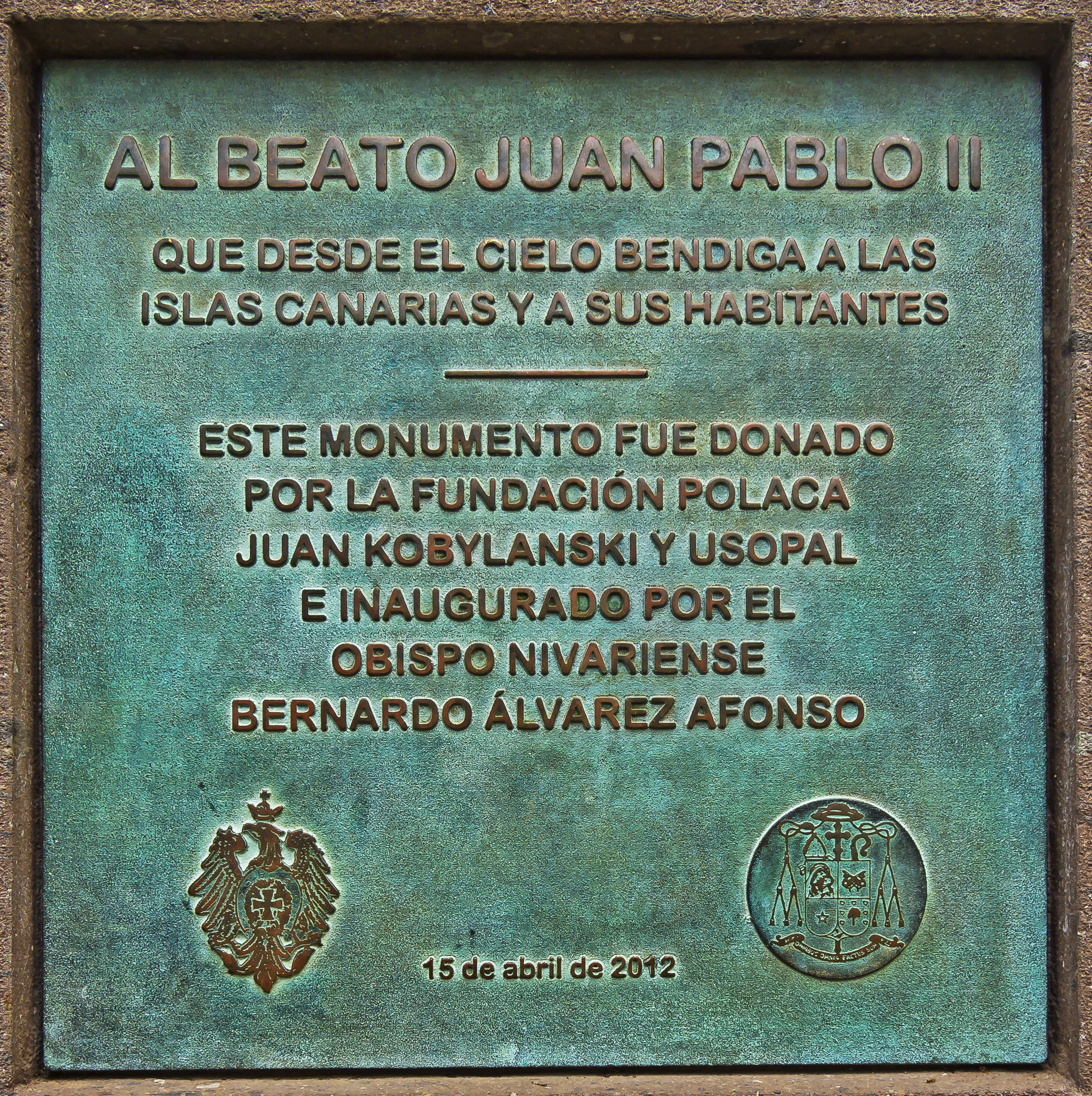 Informationstafel an der Plastik des Papstes Johannes Paul II auf der Südseite der Kirche Concepción in La Laguna